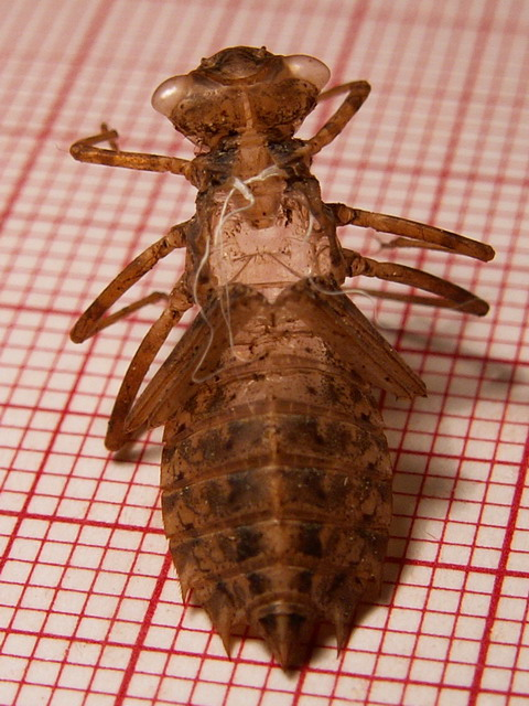 Leucorrhinia albifrons, exuvie, Ain - France